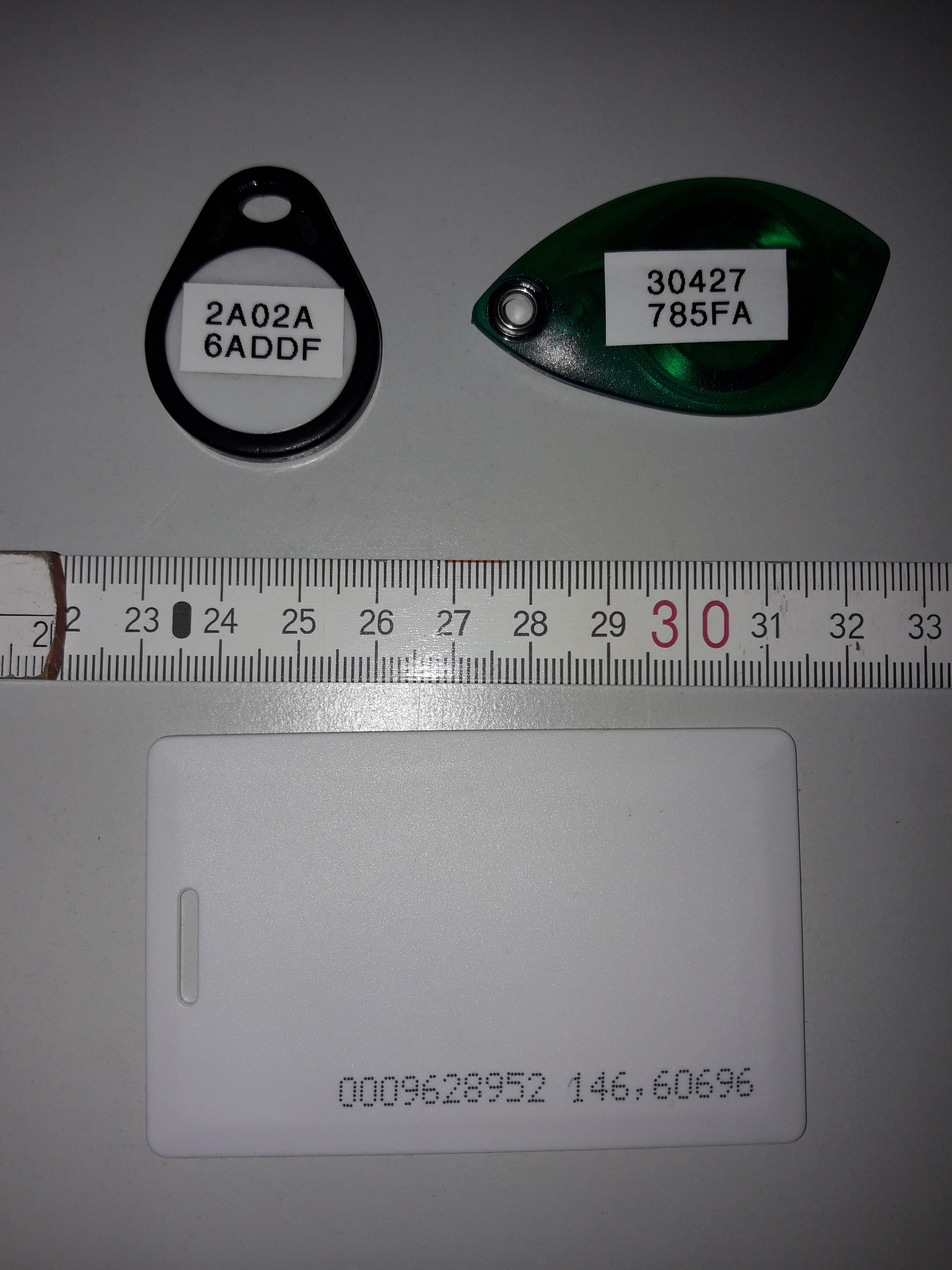 Diverse Schlüsseltransponder